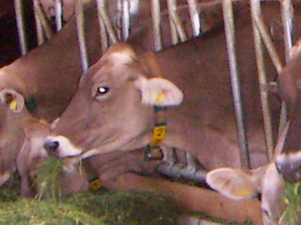 Eine Kuh in der Benediktinerpropstei Sankt Gerold im Kuhstall am Grünfutter